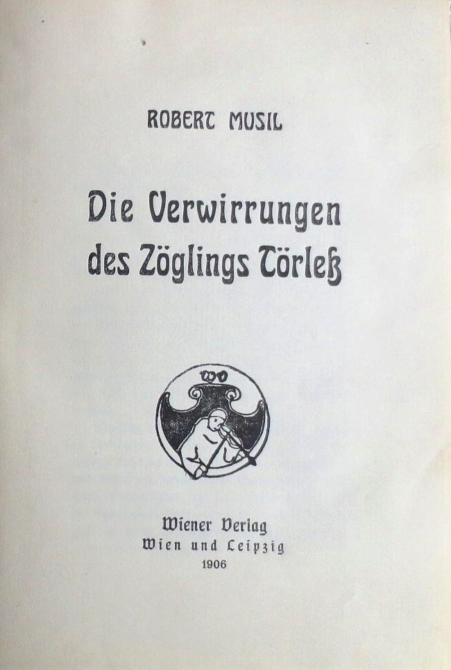 Robert Musil: Die Verwirrungen des Zöglings Törleß, Wien und Leipzig, Wiener Verlag, 1906 (= Titelblatt der Ersten Ausgabe)